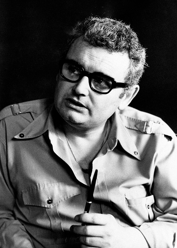 Pino Calvi